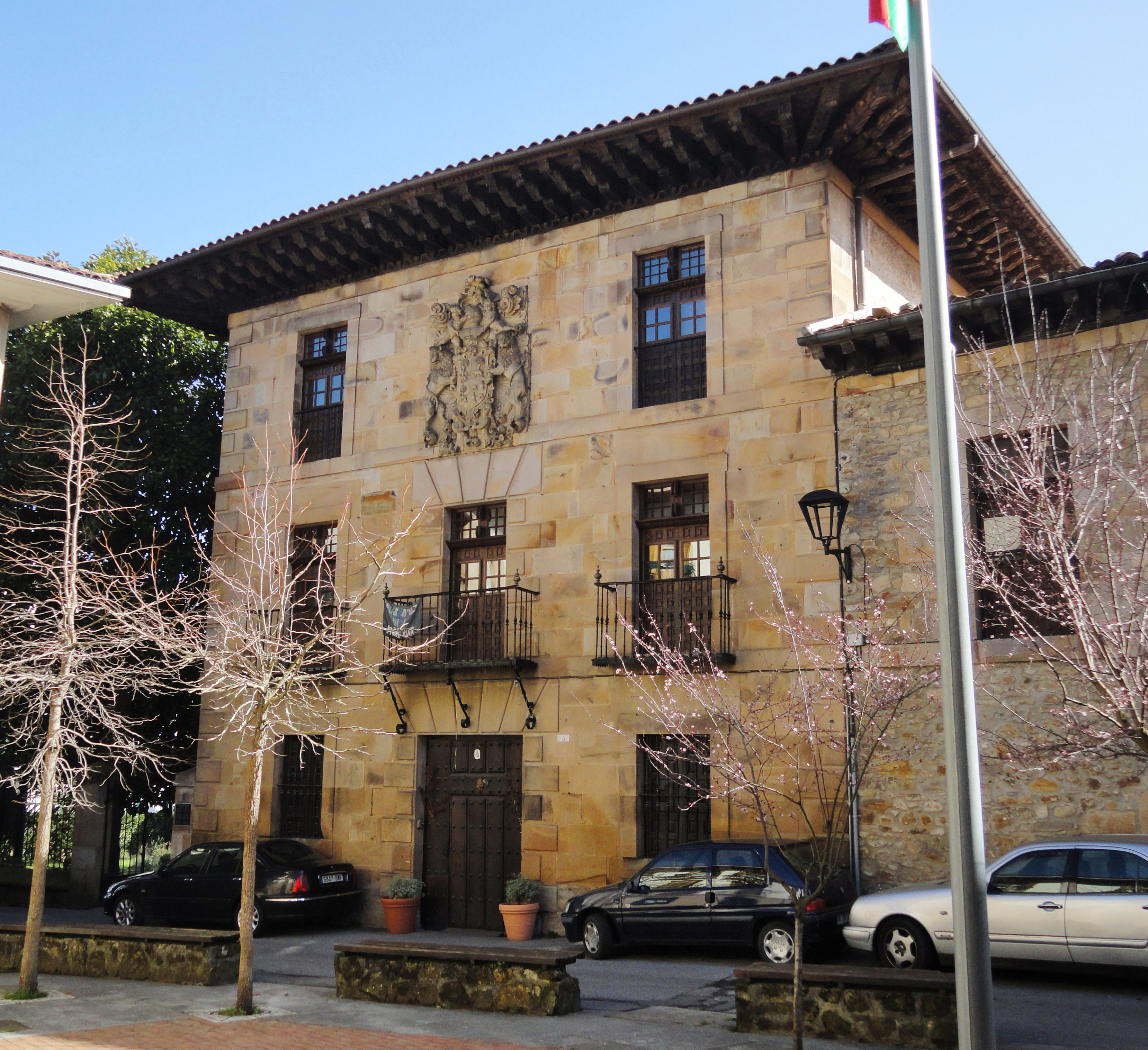 Lardizabal jauregia (Udaletxea) - Segura